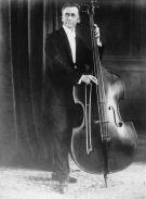 Vojtěch Kuchynka - český kontrabasista, sbormistr a hudební skladatel